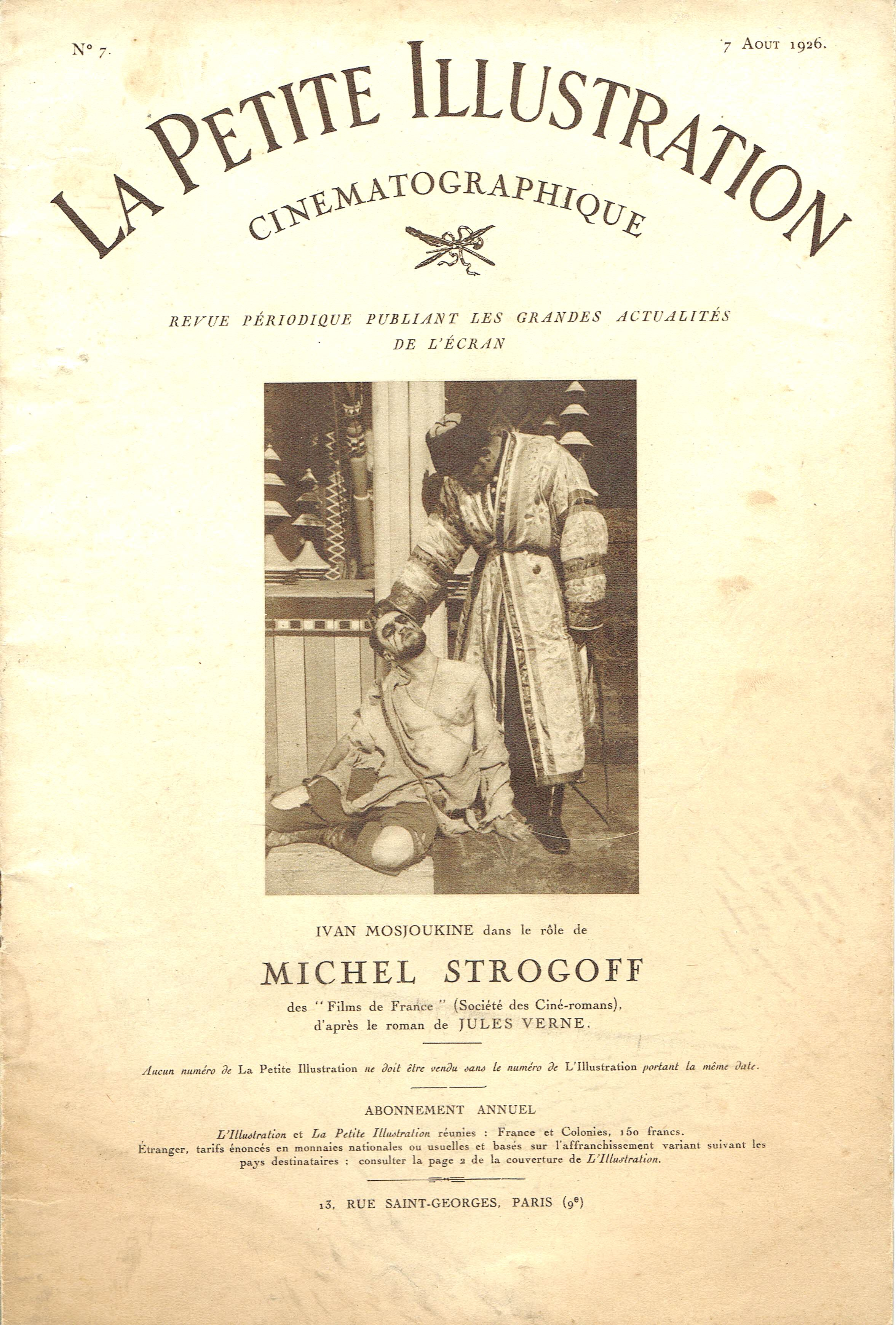 Du film Michel Strogoff, de Victor Tourjansky, en 1926 : la une de l'Illustration